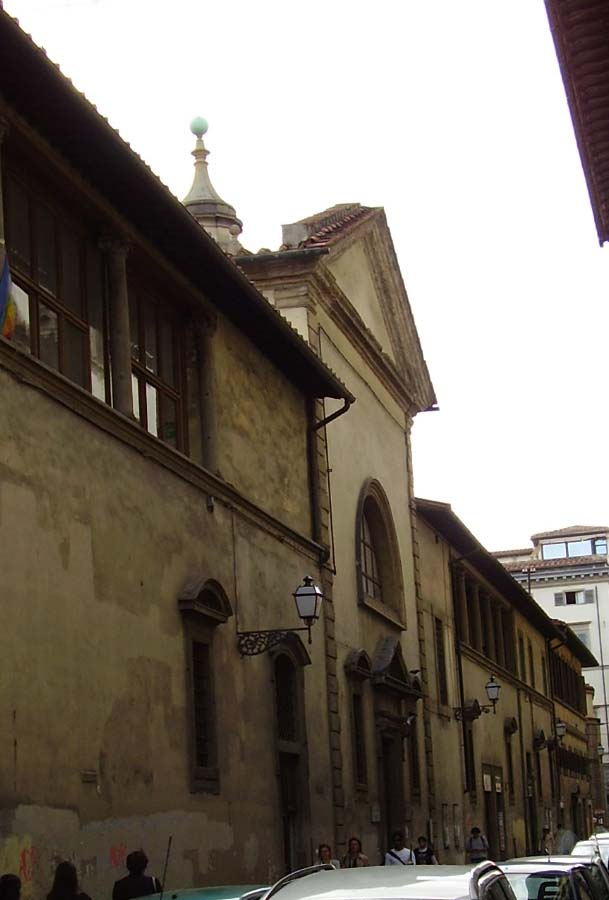 Santa Maria degli Angeli, church facade in Florence, Italy